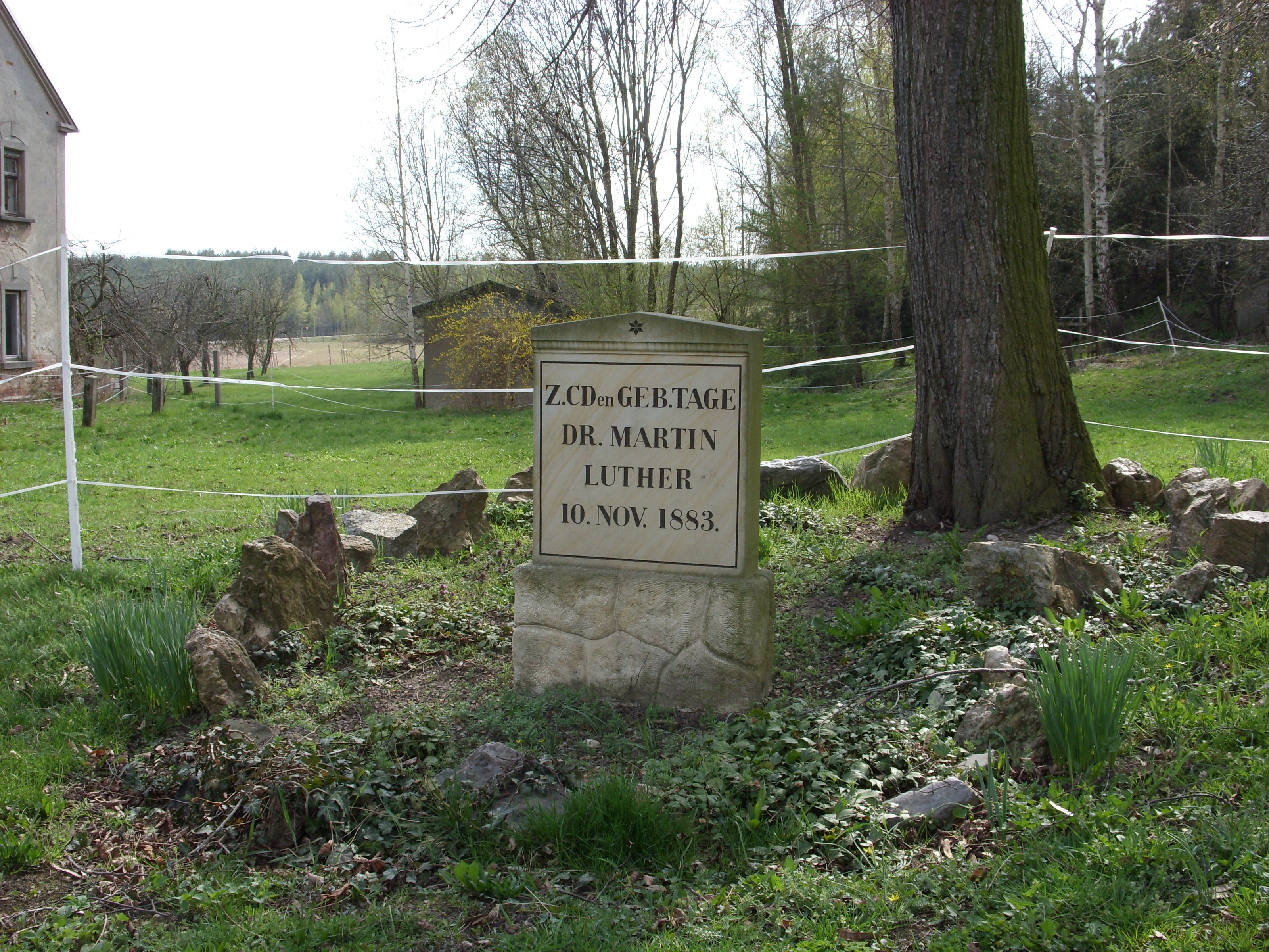 Hornjoserbsce: Lutherowy kamjeń we Wětrowje